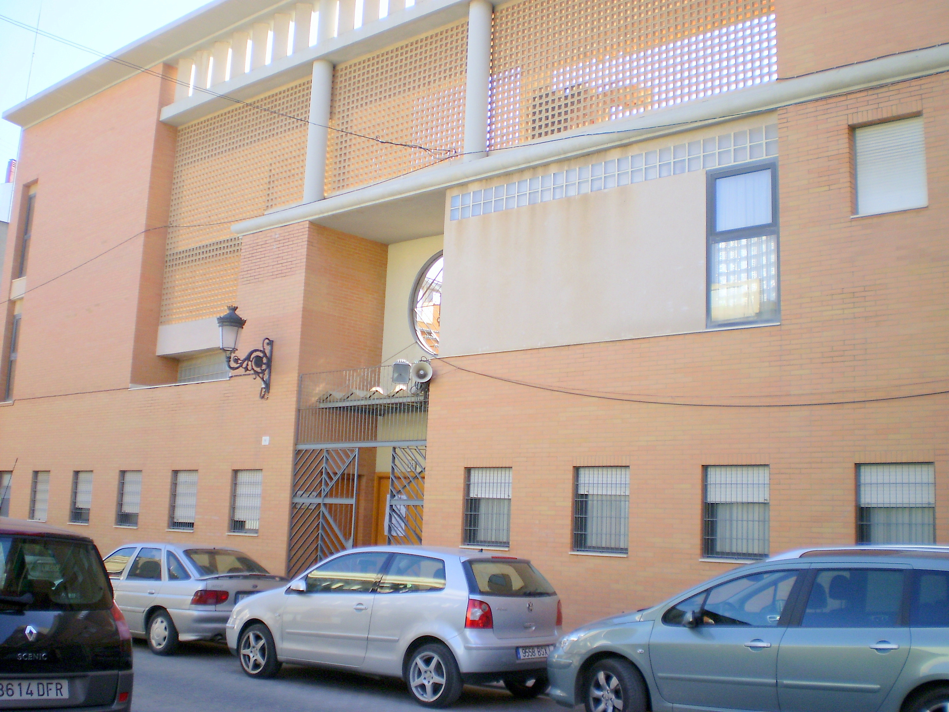 Benimamet, España - Convento de las Hermanas Reparadoras